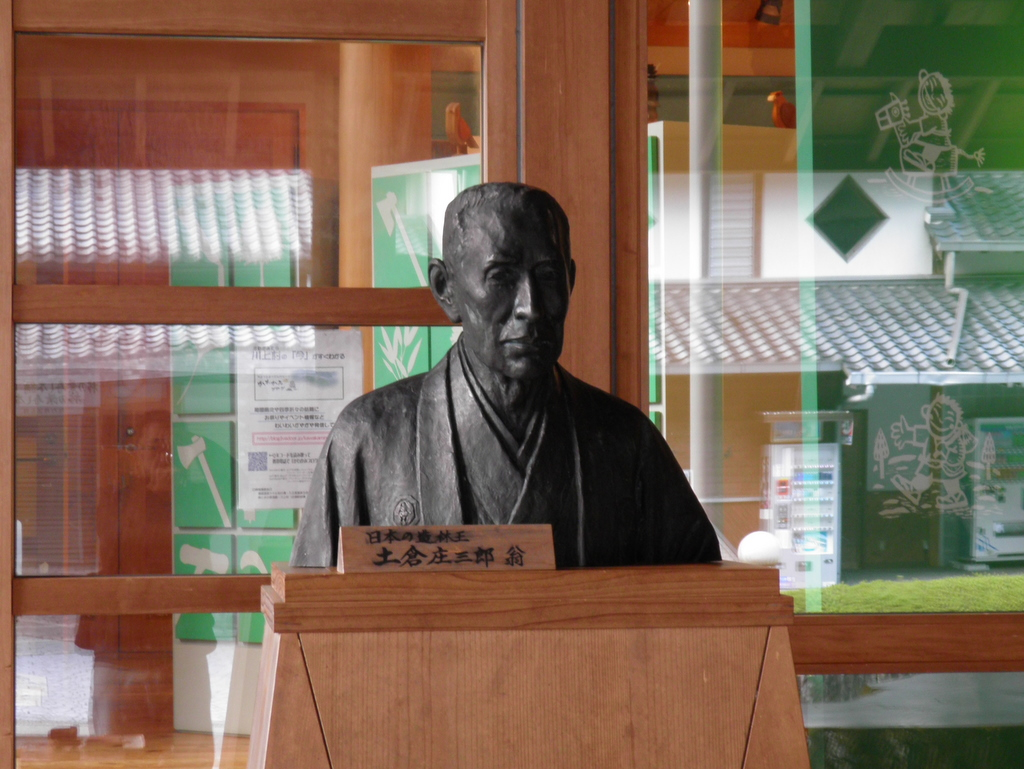 土倉庄三郎翁の銅像（奈良県吉野郡川上村西河、山幸彦のもくもく館）